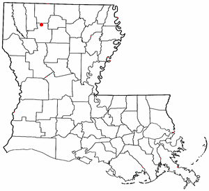 Volapük: Topam in tat: Louisiana.